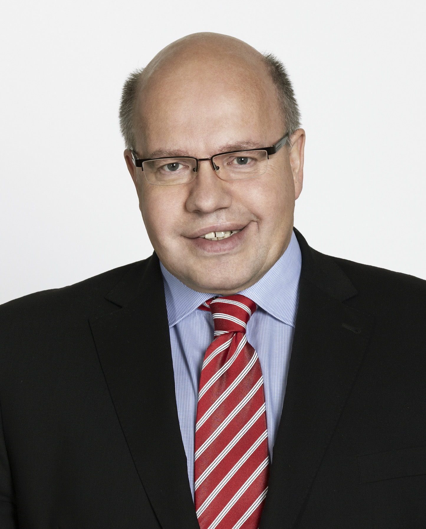 Peter Altmaier, Bundesminister für Umwelt, Naturschutz und Reaktorsicherheit